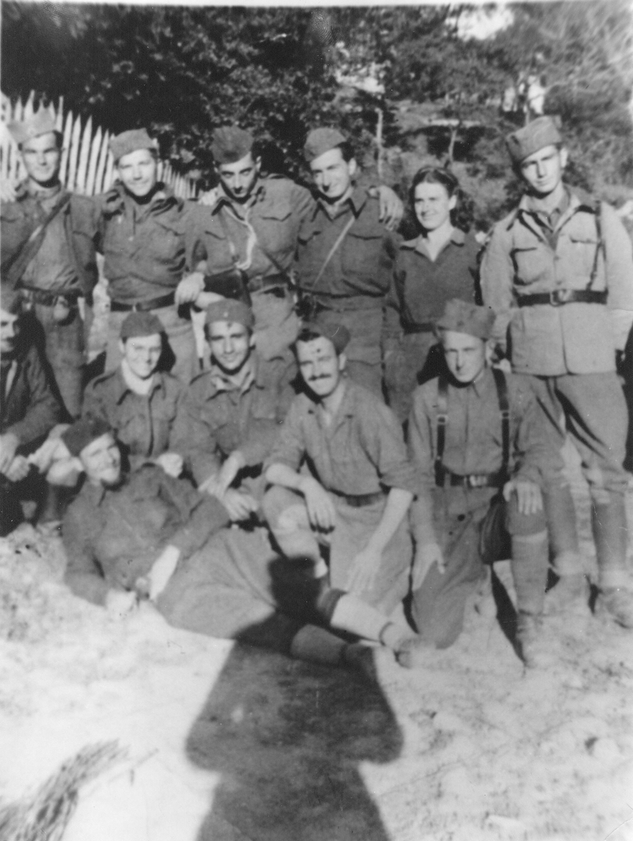 Штабот на X-тата српска бригада, Црна Трева, 25 август 1944. Трет од лево е Киро Глигоров, борец од III македонска бригада.